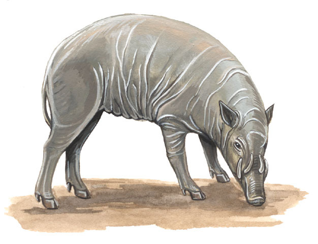 Gambar Babyrousa celebensis